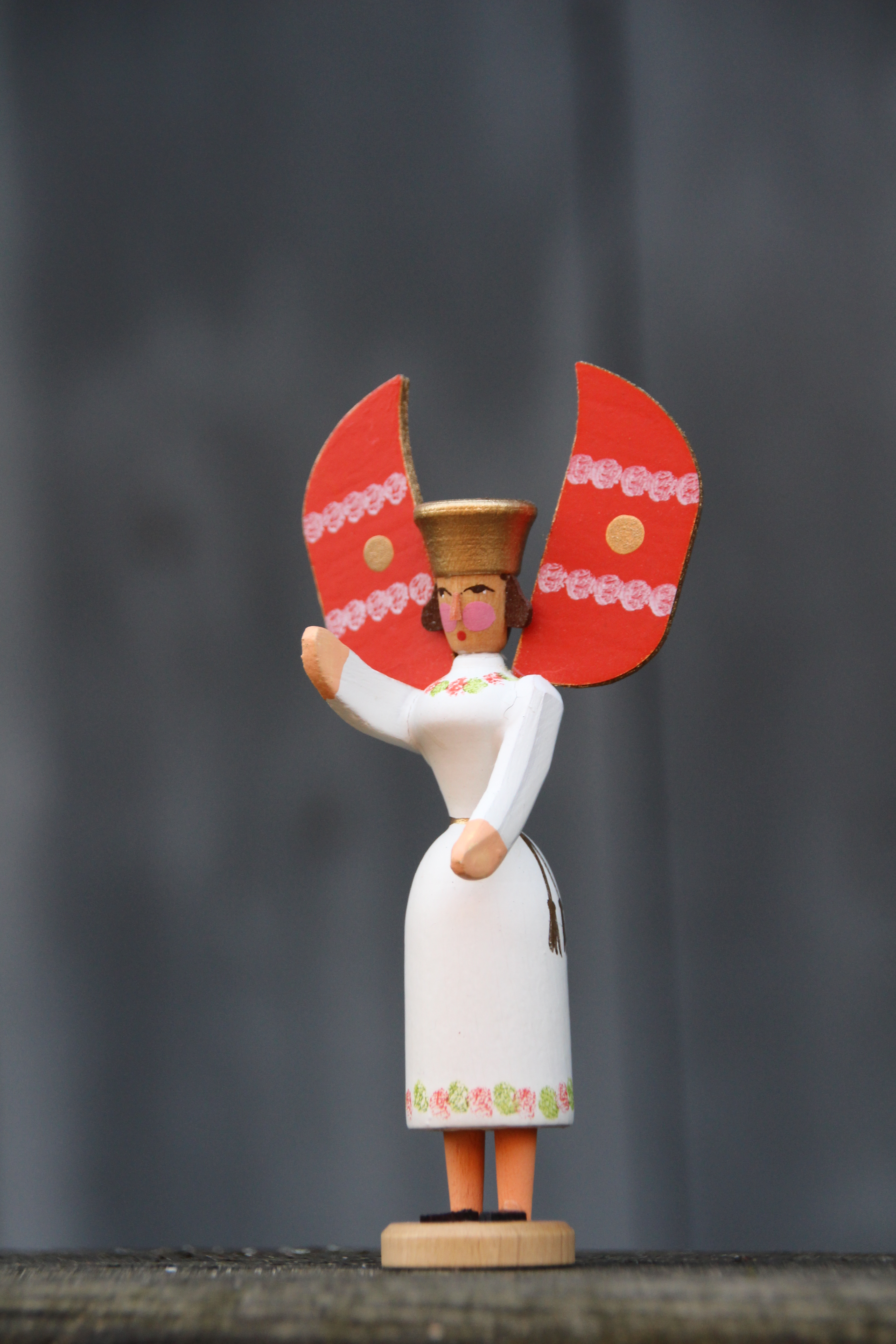 Erzgebirgischer Lichterengel in der selteneren Form der Beinengel, erzgebirgisch „Baa-Engel“, bei denen der untere Teil der Beine und die Füße zu sehen sind – „Baa-Engel“.